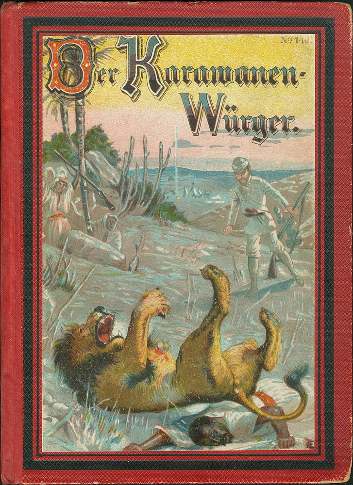 Der Karawanenwürger